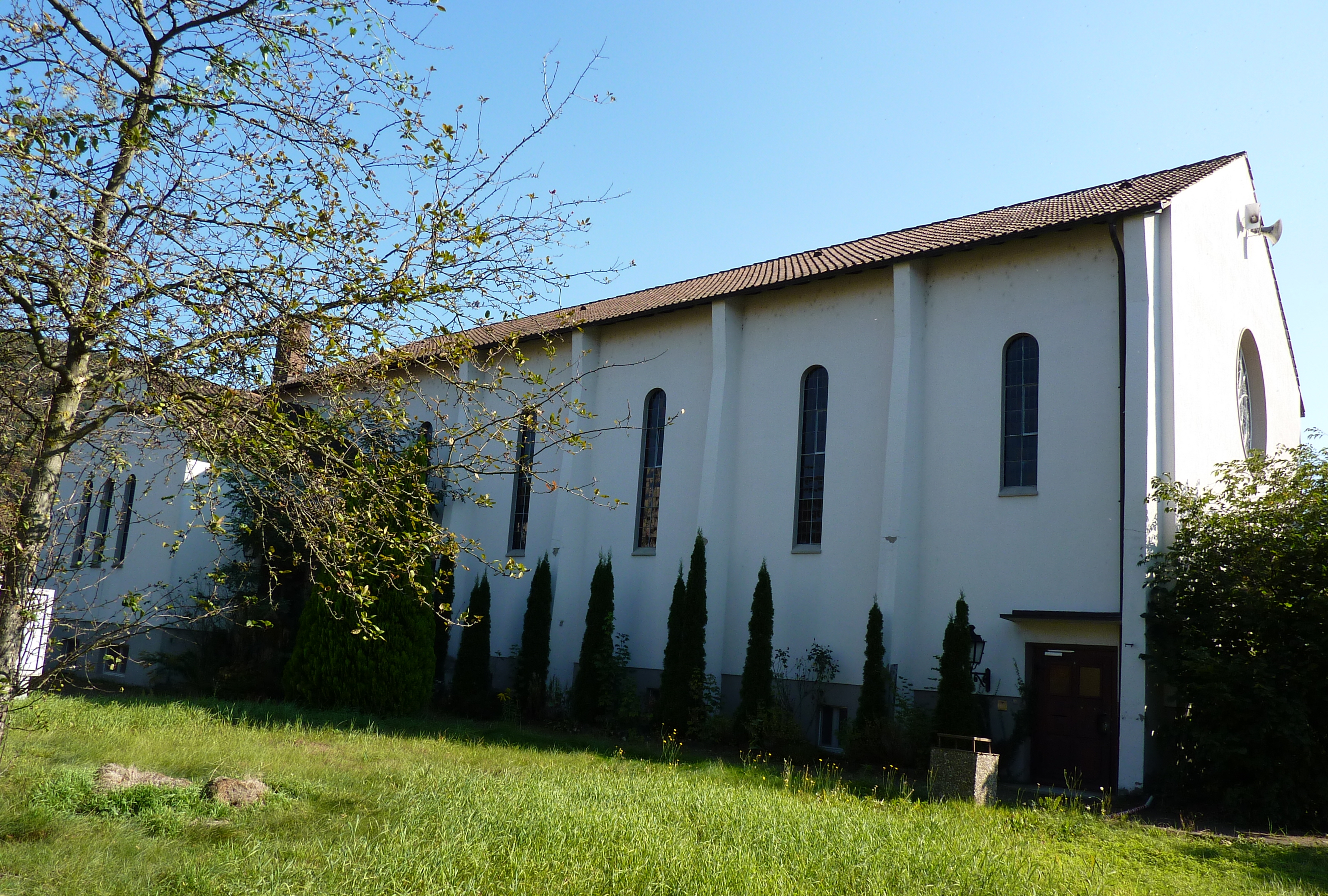 Chapel aus Blickrichtung Nordwest nach Südost